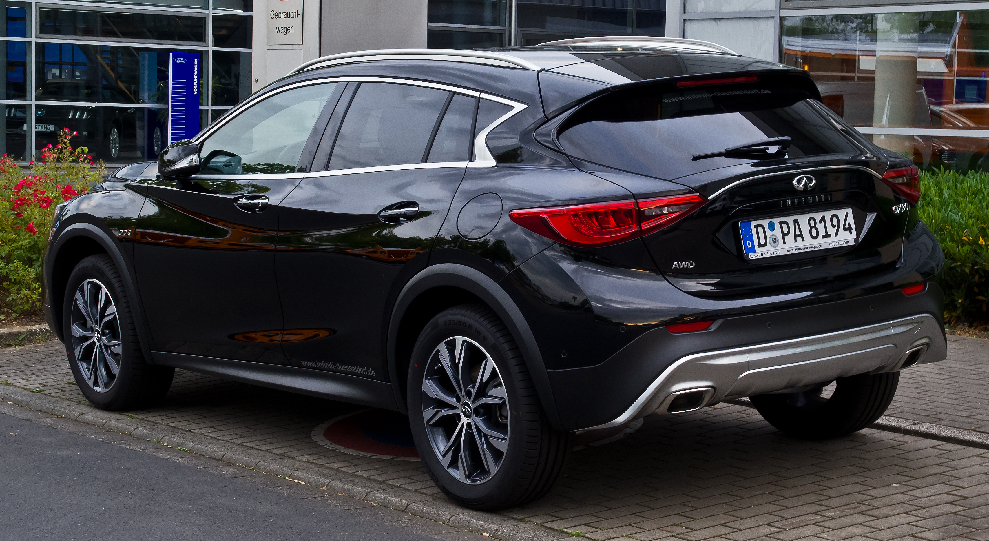 Infiniti QX30 2.2d AWD Premium Tech